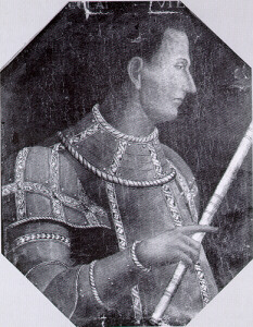 Paolo Vitelli Condottiere Città di Castello Italie